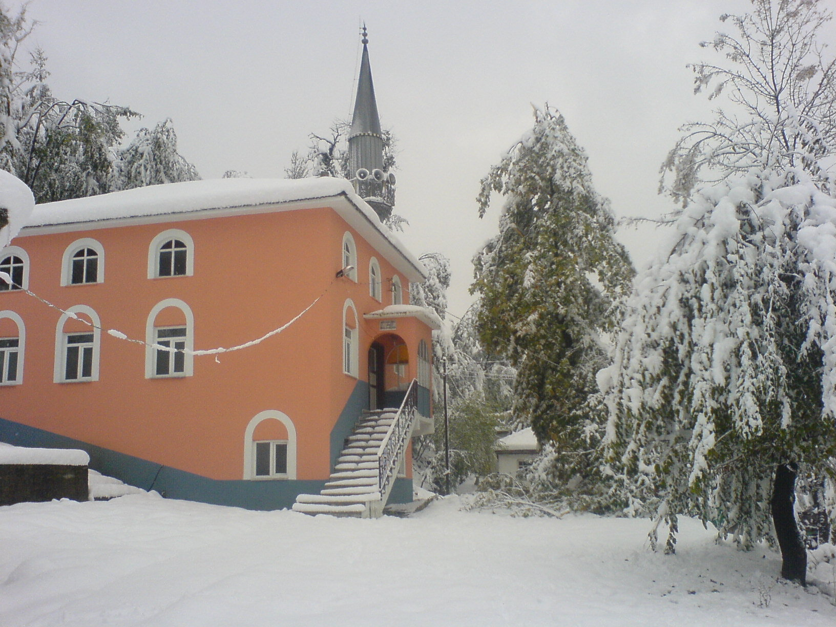 mansurlar köyü camii